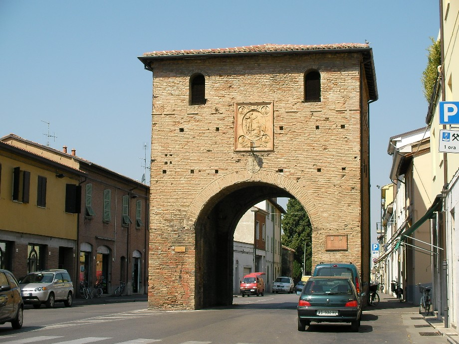 La Porta delle Chiavi, unica superstite delle porte urbare del XV secolo. Prende il nome dal dono delle chiavi della città a Pio IX nel 1857